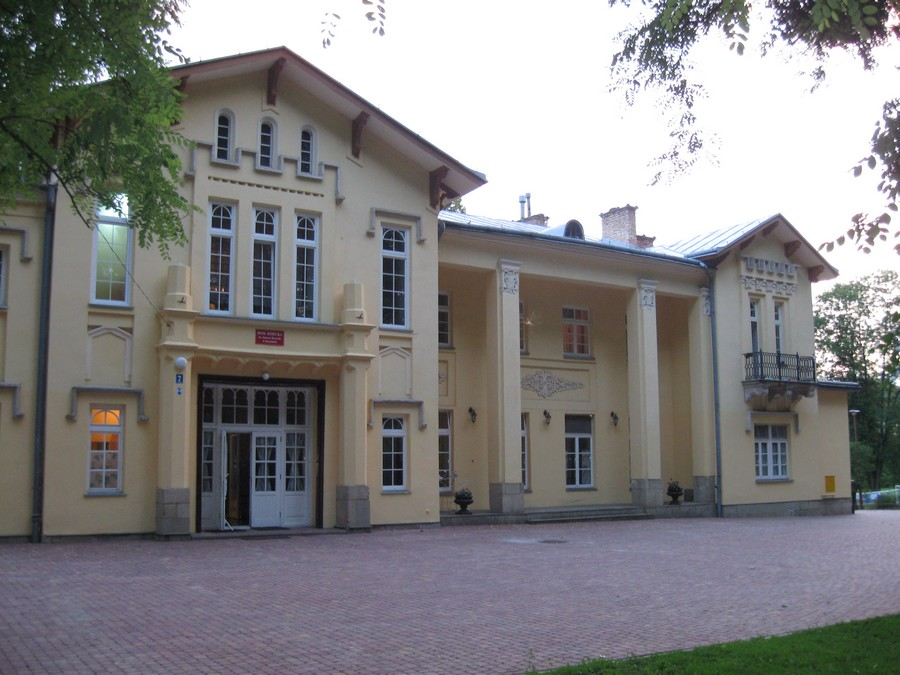 Strzyżów, pałac